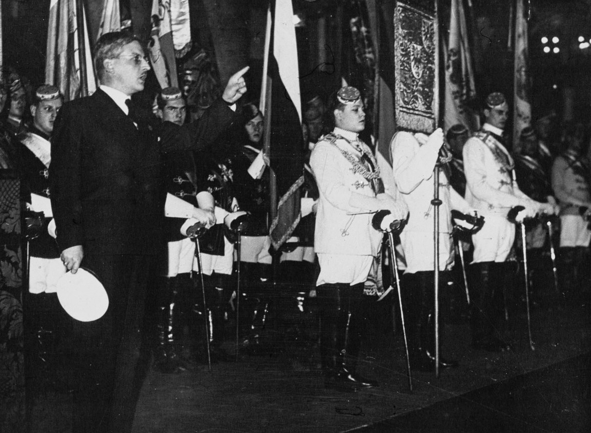 Kurt von Schuschnigg bei Verbindungstreffen Österreichischer Studenten (AV Austria Innsbruck ?).